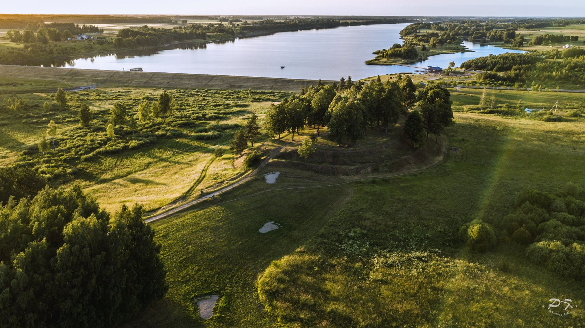 Kupiškio piliakalnis